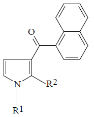 Нафтоилпиролы